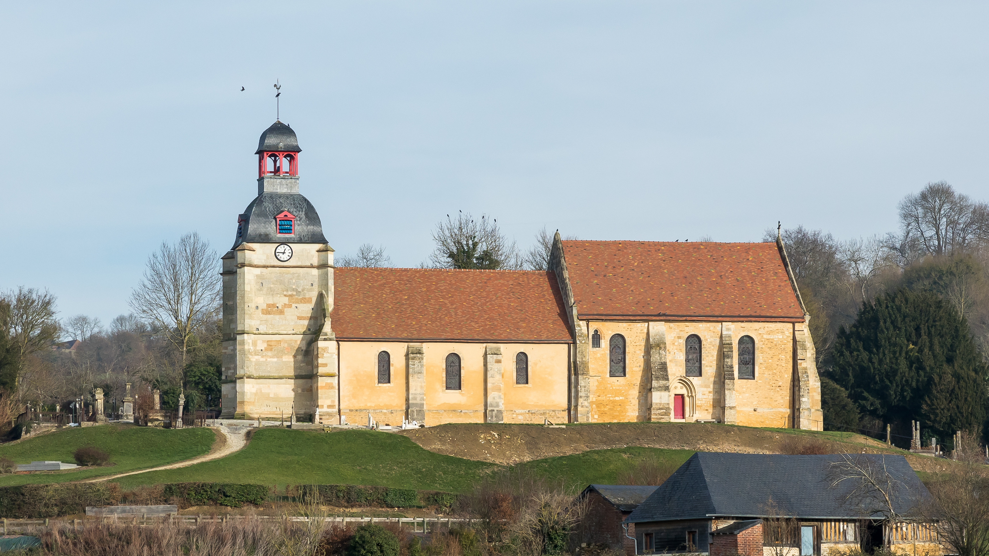 Église Notre-Dame de Notre-Dame-d'Estrées